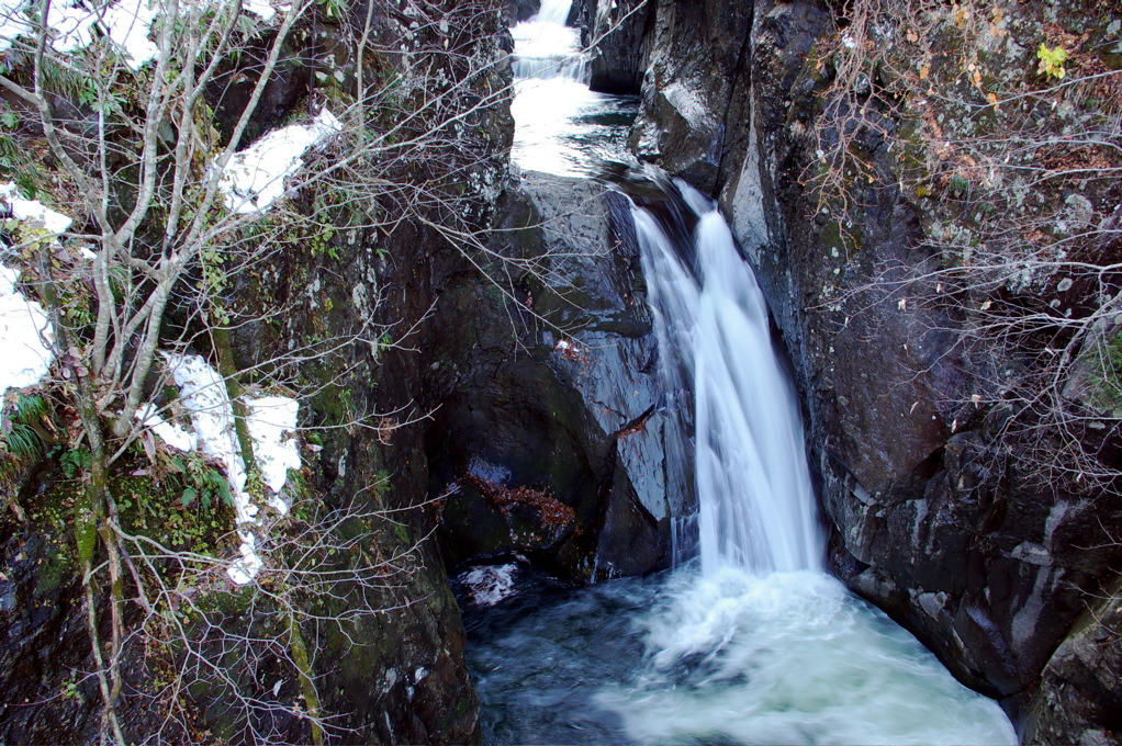 arasawano-taki falls